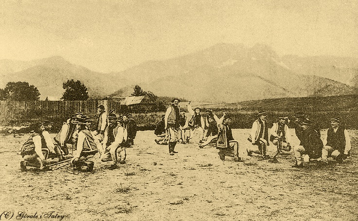 Tatry, taniec zbójnicki górali